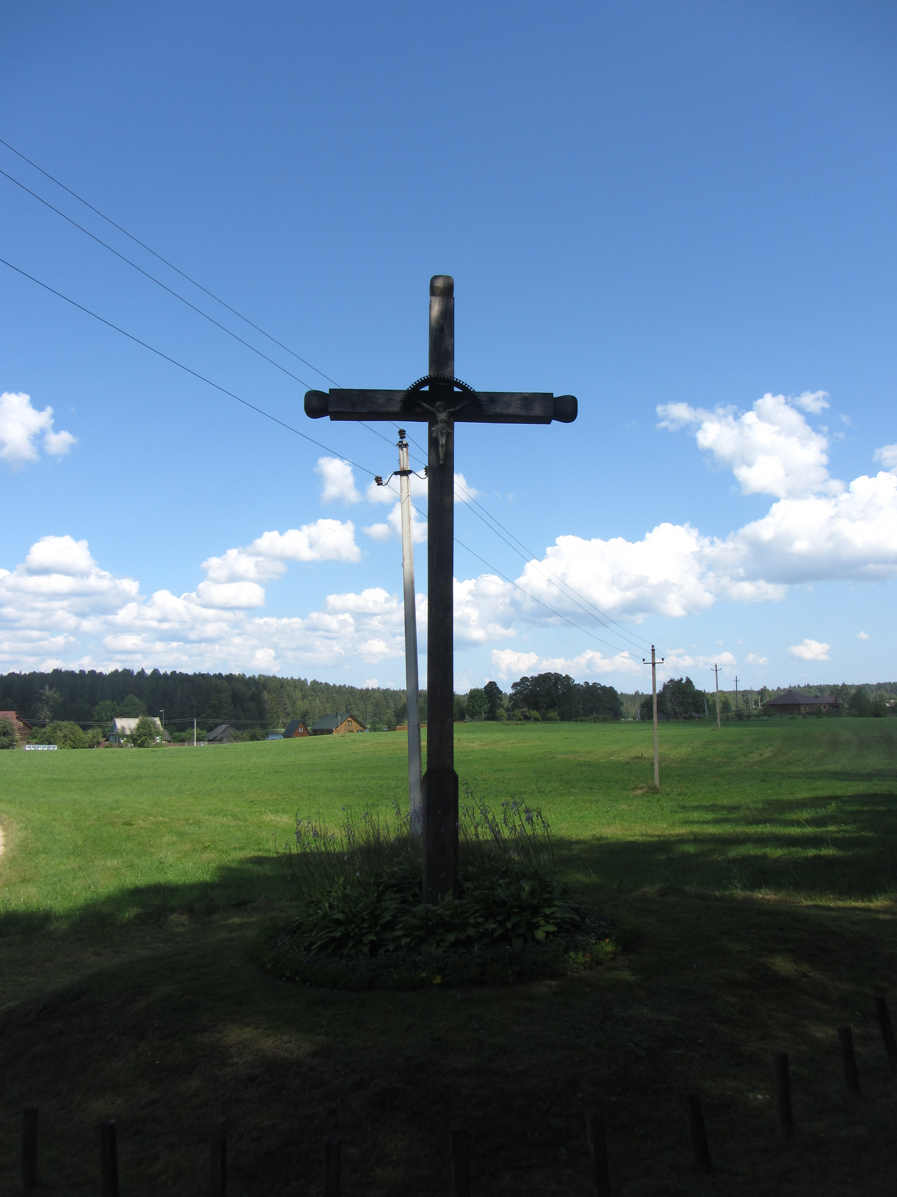 Petruškos 18148, Lithuania